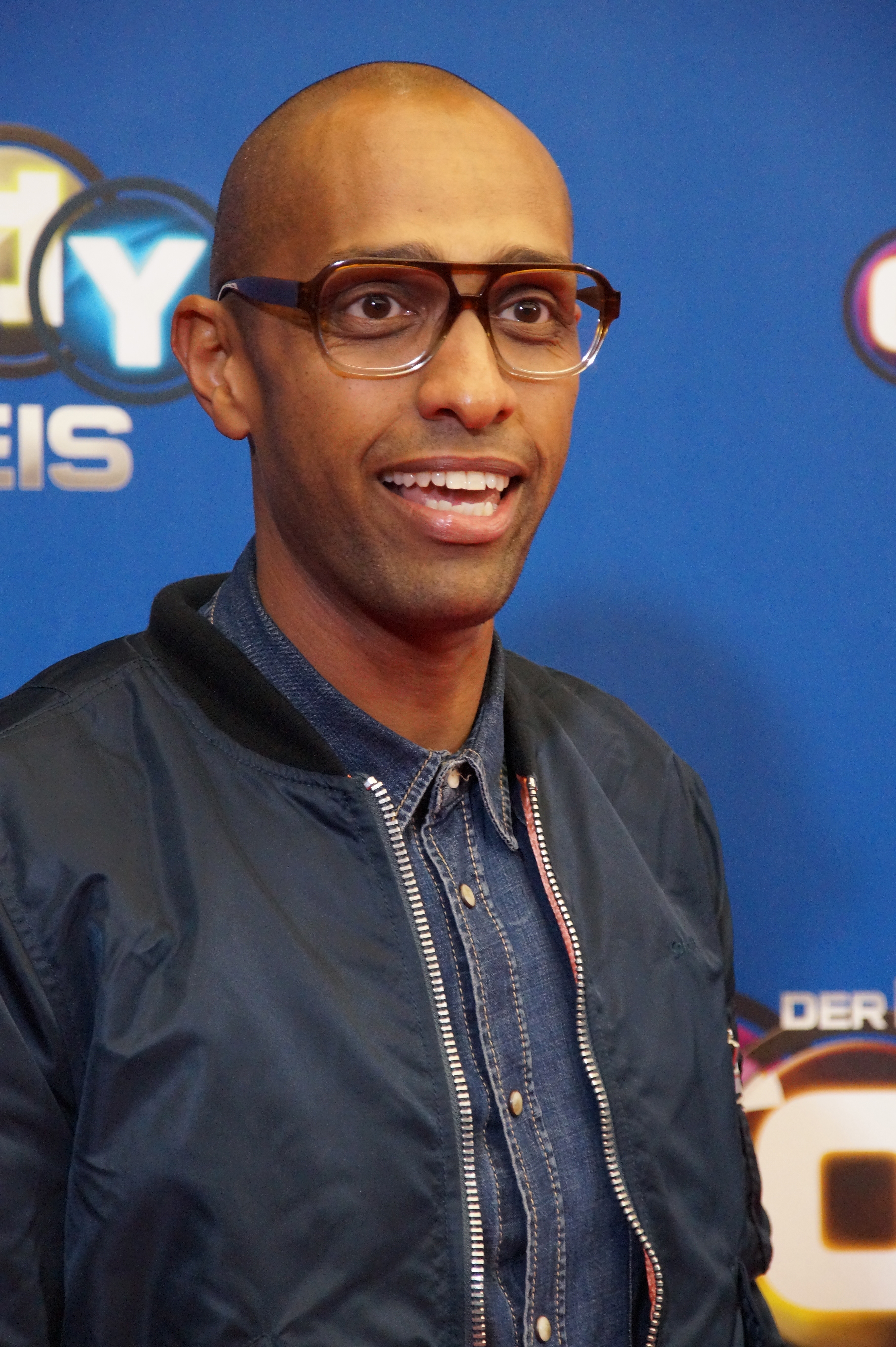 Amiaz Habtu beim Comedypreis 2016, im Oktober 2016, Köln.